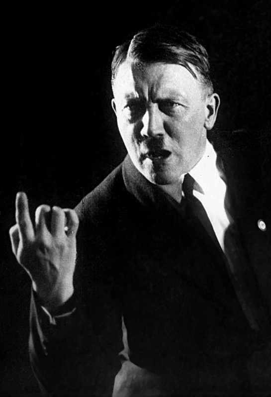 Die Geste der rechten Hand ! Typische Rednergesten, bei welchen die Bewegung der rechten Hand den Höhepunkt in den Ausführungen des Redners unterstreicht. Der Führer der Nationalsozialisten Adolf Hitler in einer typischen Rednerpose. Information added by Wikimedia users.Brustb (im Atelier; in Rednerpose; dunkler Anzug, Parteiabzeichen auf d.linken Revers; Ausschnitt) Fotografie vor August 1927. Vgl.: Bayerische Staatsbibliothek, Fotoarchiv Hoffmann, Bild-Nr. hoff-1842.